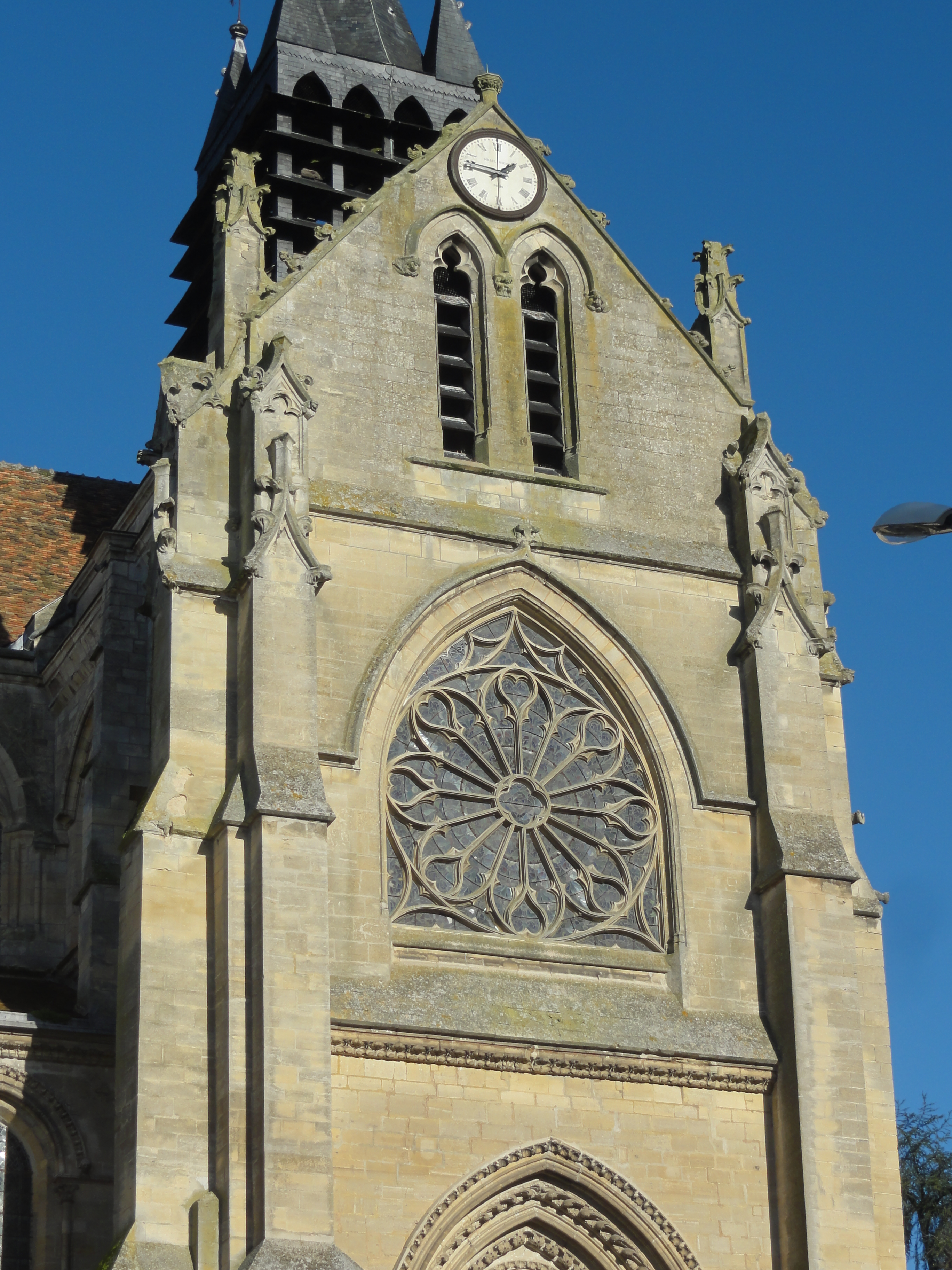 Croisillon sud, parties hautes.